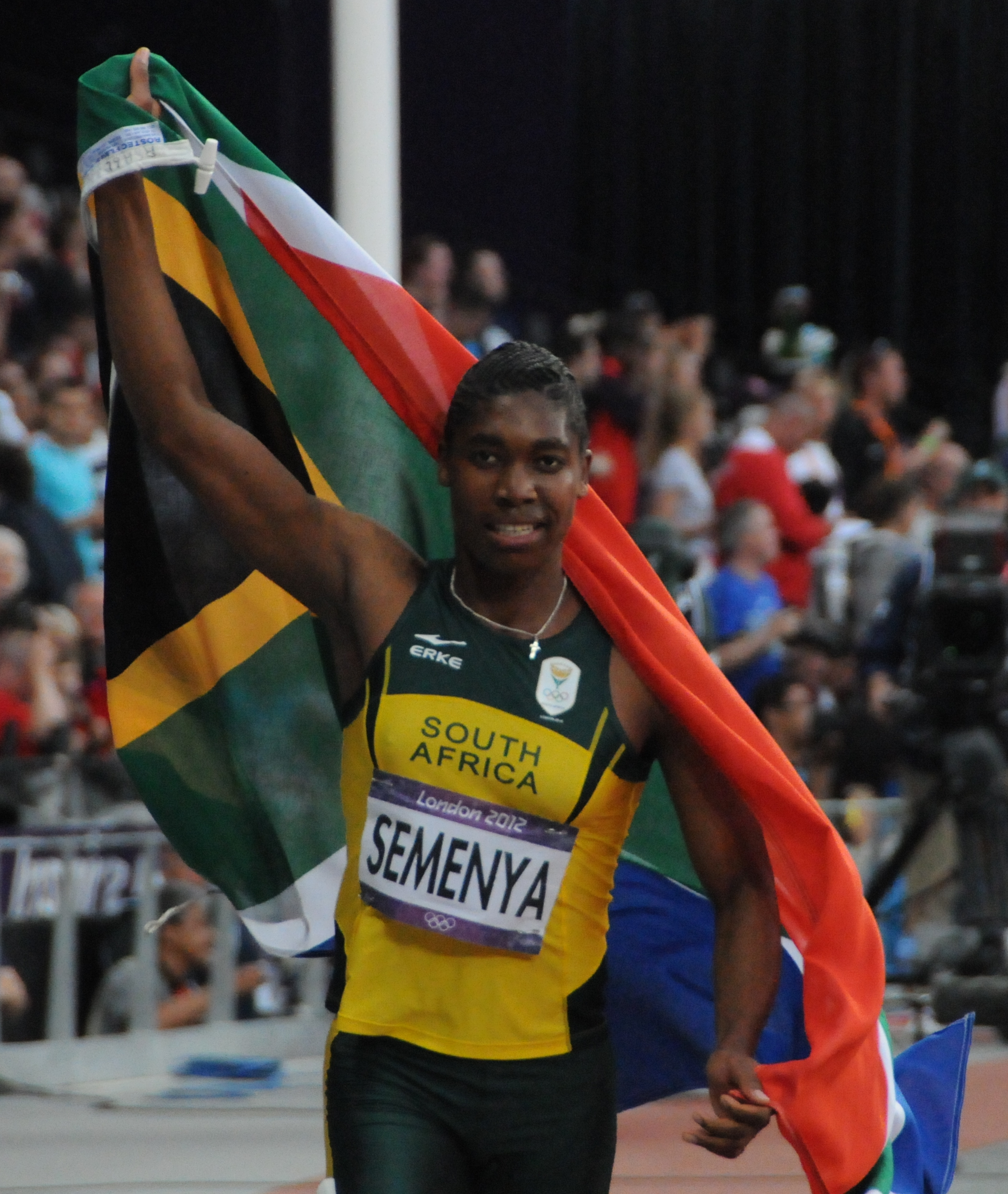 La sud africaine: Caster Semenya, médaille d'argent aux 800m aux JO de Londres